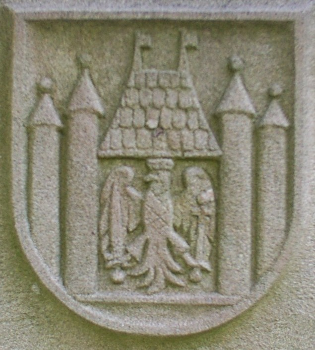 Landkreiswappen des ehemaligen Landkreises Meseritz